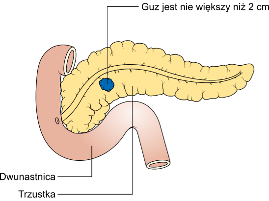 Cecha T1 w TNM raka trzustki